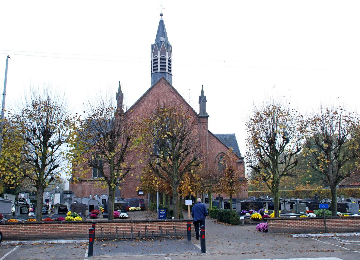 Parochiekerk Onze-Lieve-Vrouw, Klein-Sinaai (Stekene)